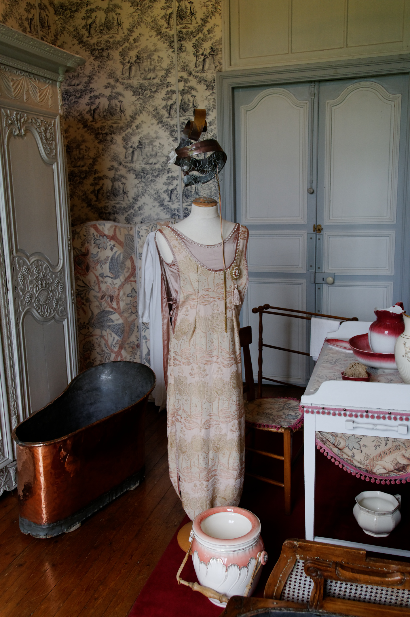 Château de Valençay, le Cabinet de toilette, Valençay, Indre, France